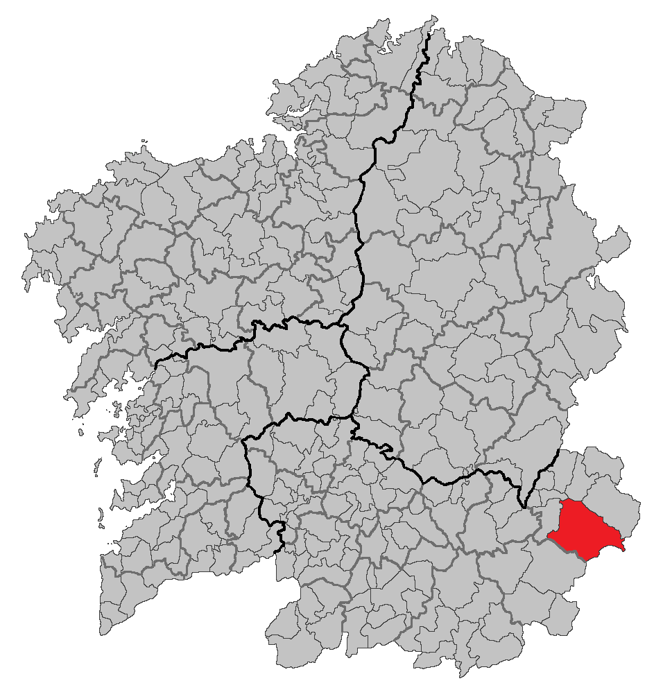 Mapa coa localización do concello de A Veiga.